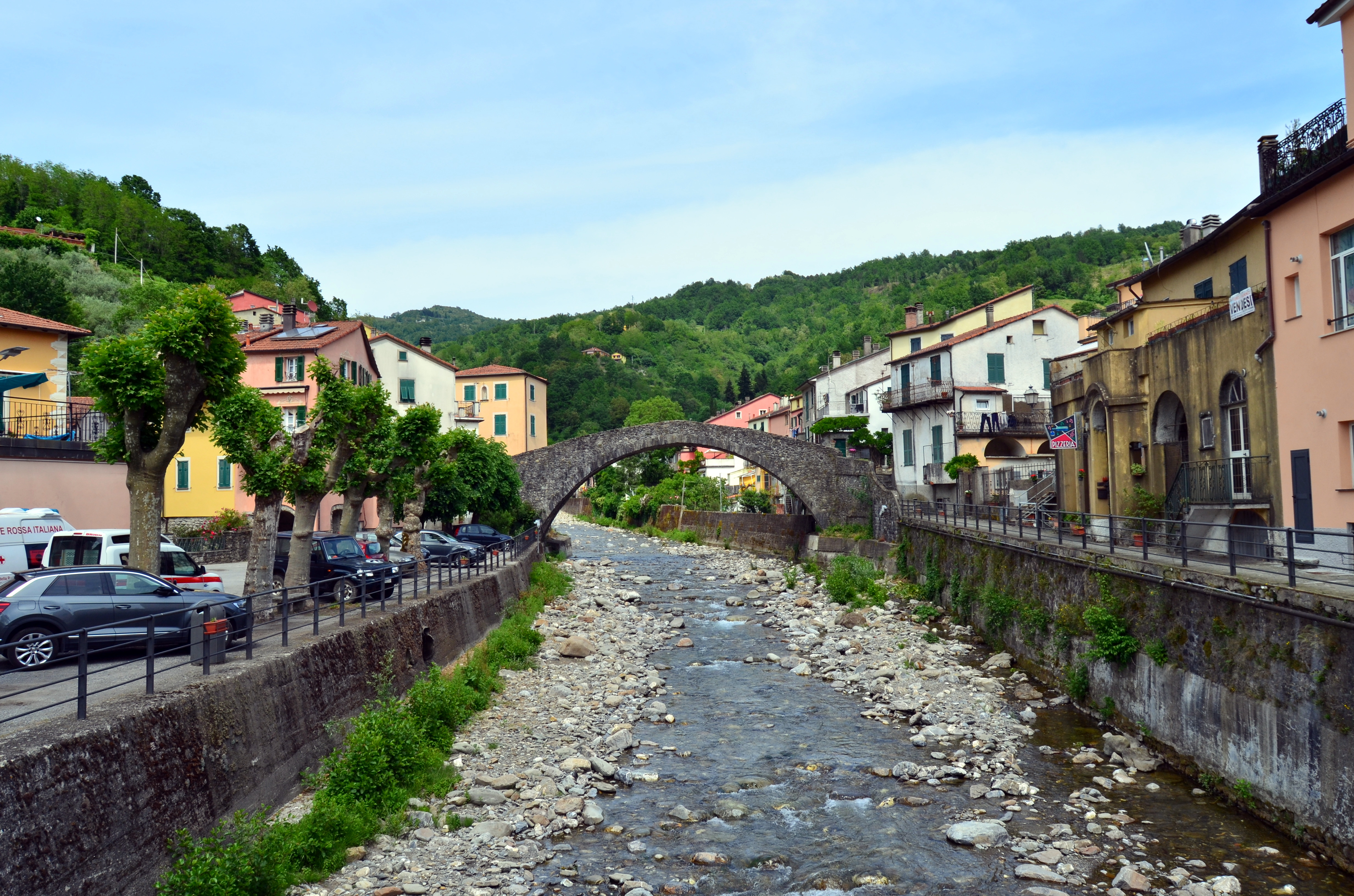 Il ponte di Grexino presso Varese Ligure, Liguria, Italia